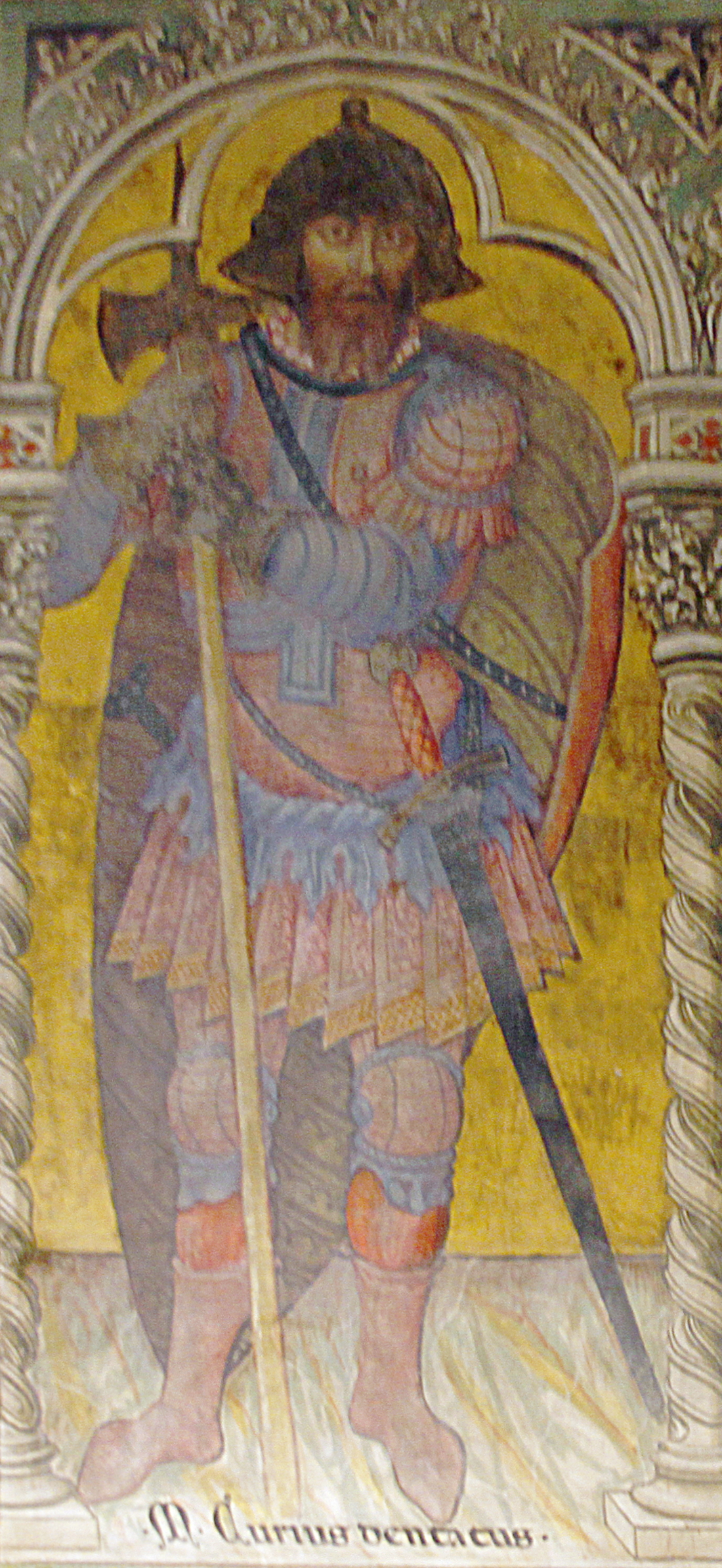 Palazzo Pubblico - Siena